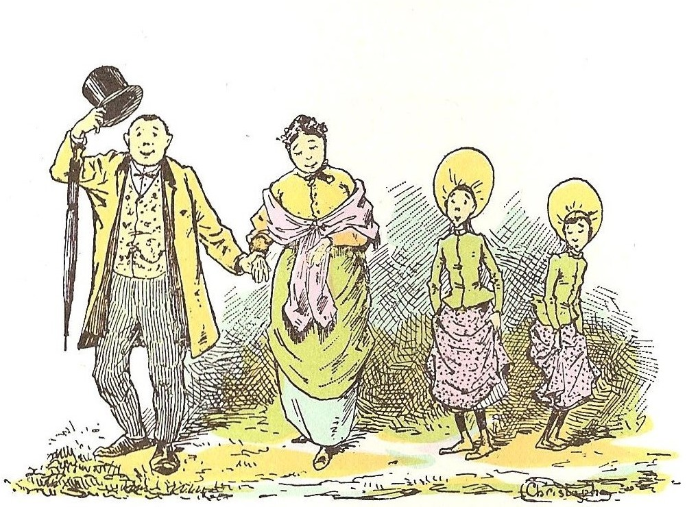 Les quatre membres de la famille Fenouillard. De gauche à droite : Agénor, Léocadie, Artémise et Cunégonde.